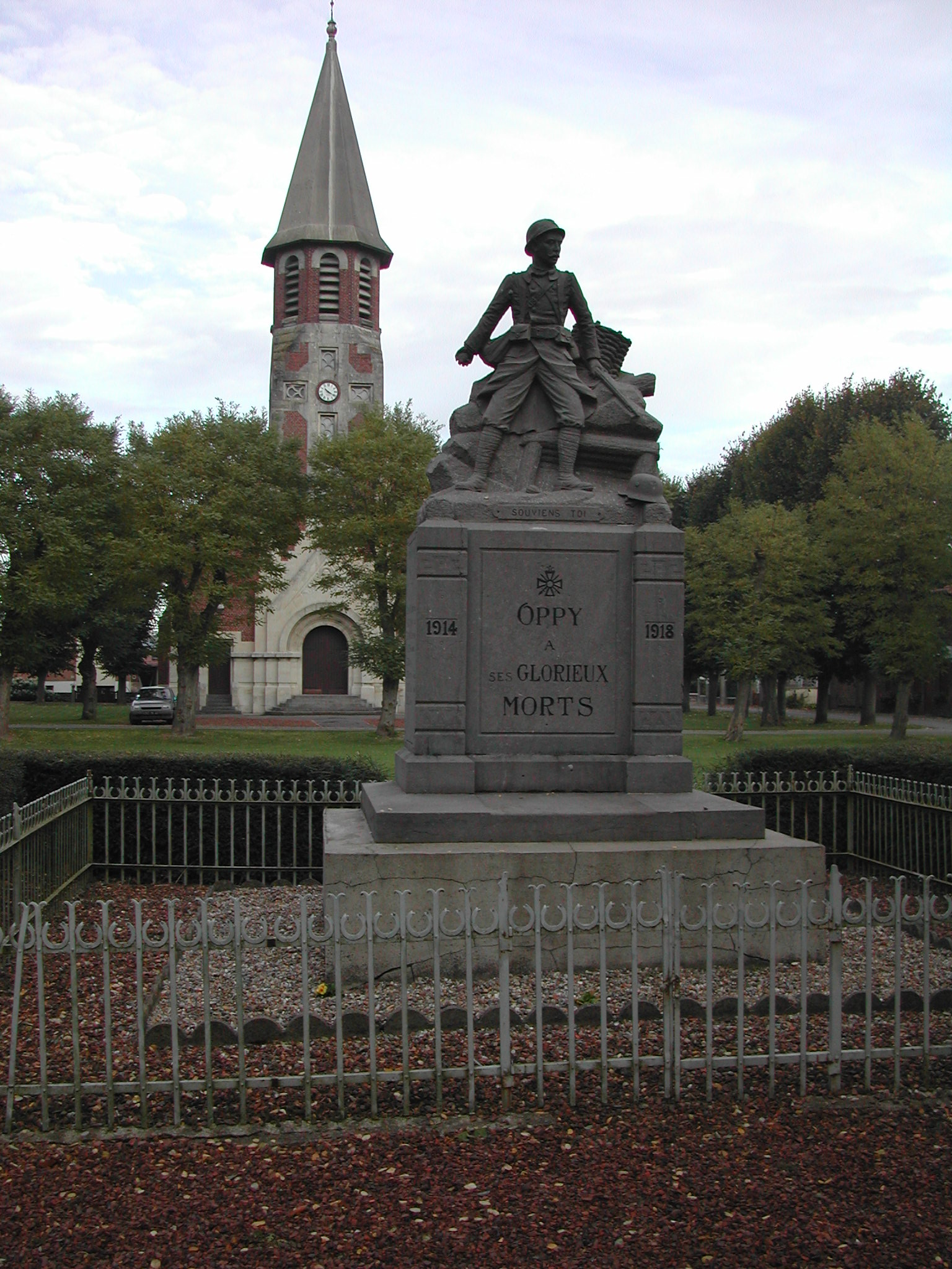 Monument aux morts d'Oppy